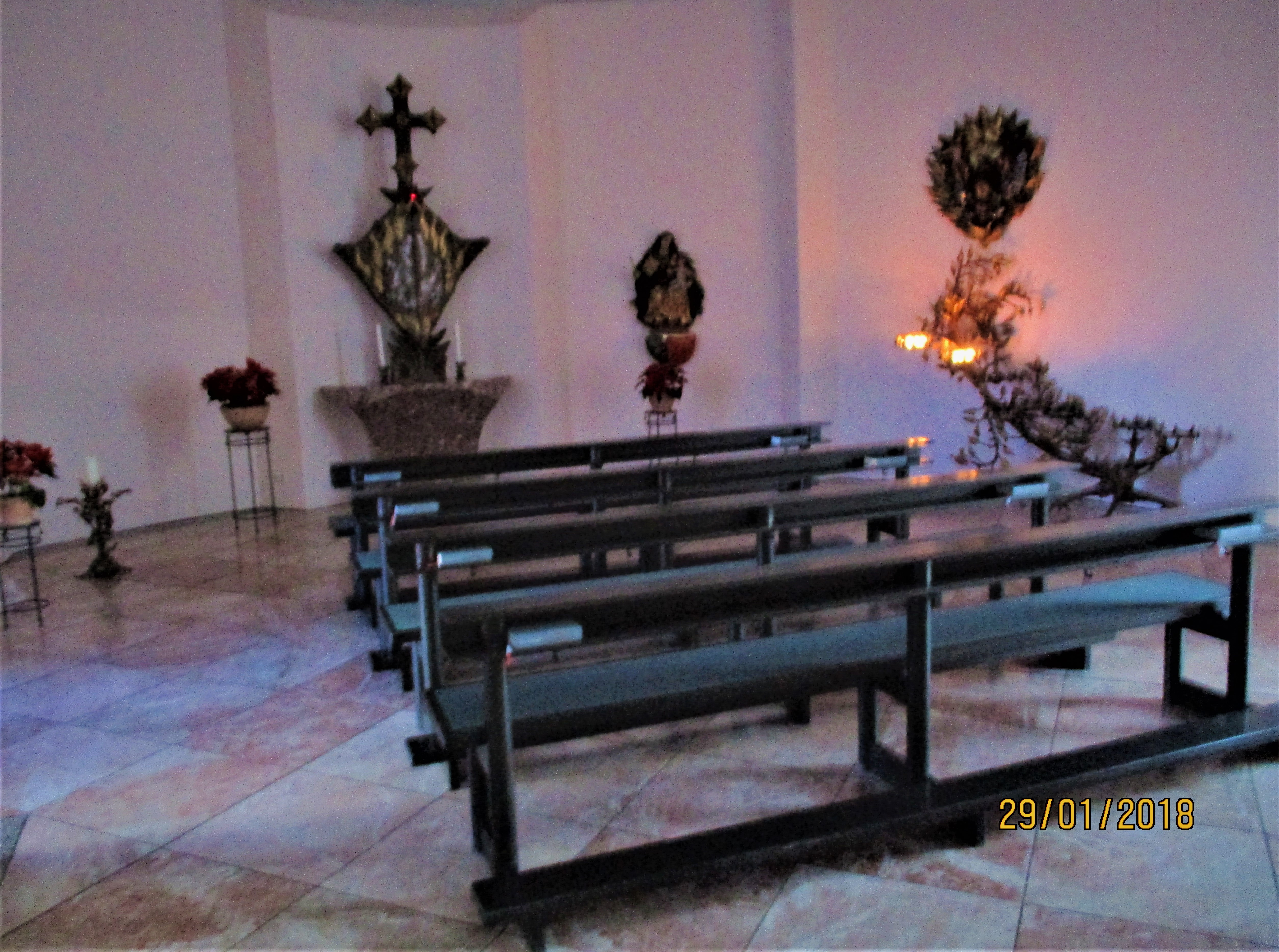 Emmauskirche und Ökumenisches Kurseelsorgezentrum, Kurallee 2, Bad Griesbach im Rottal (Sakraments-Kapelle)